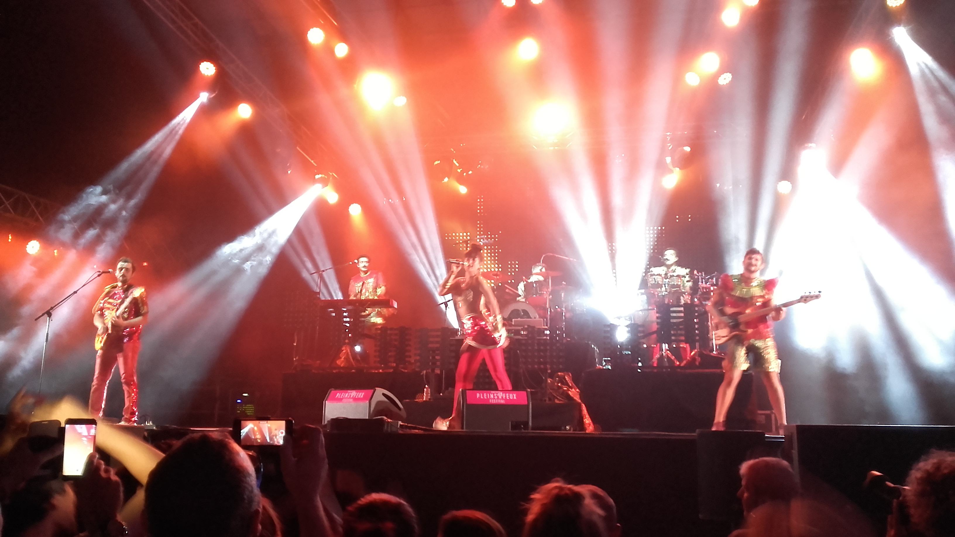 Deluxe à Bonneville lors de la 19ème édition de Pleins Feux festival